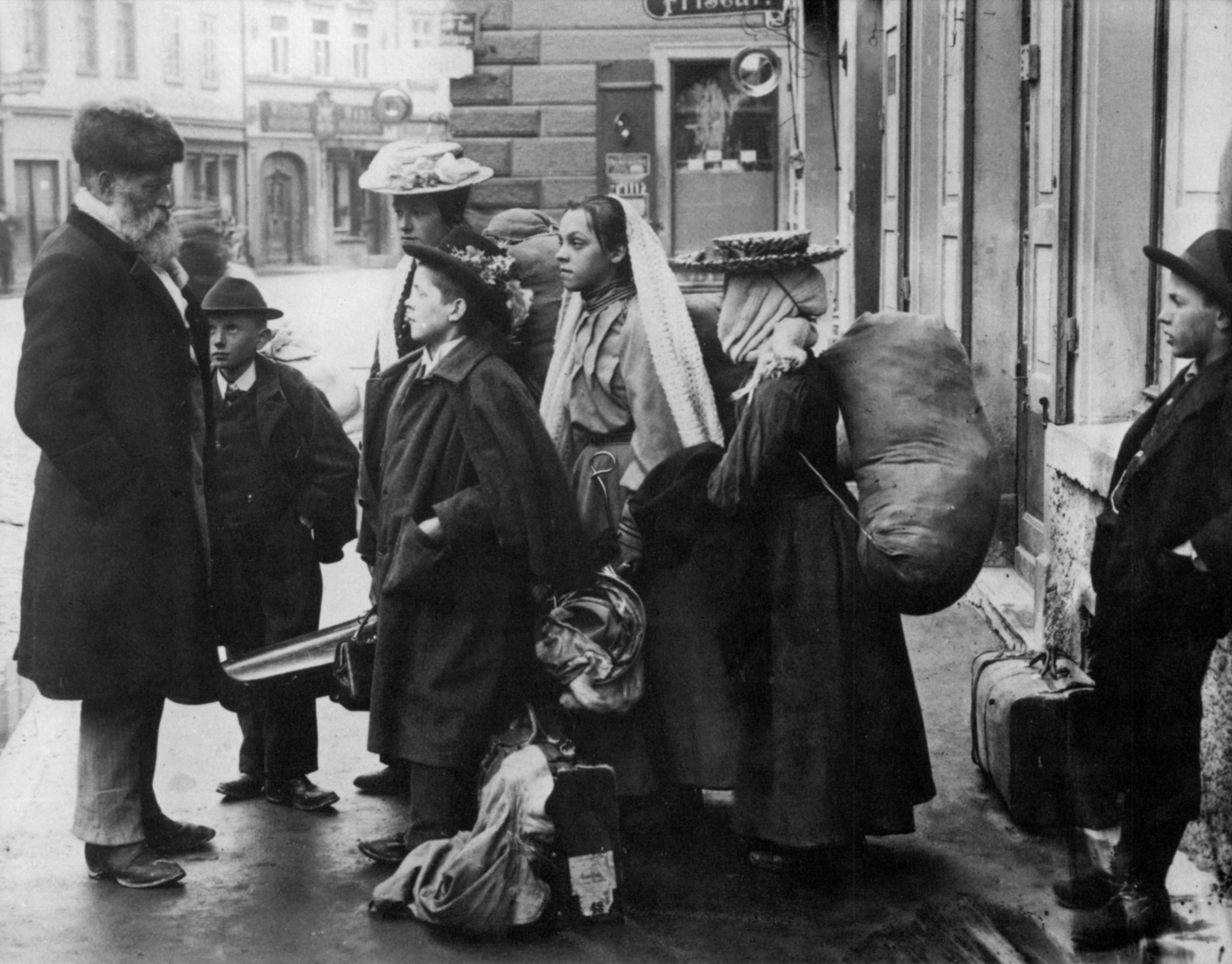 Hütekinder in Friedrichshafen [1]